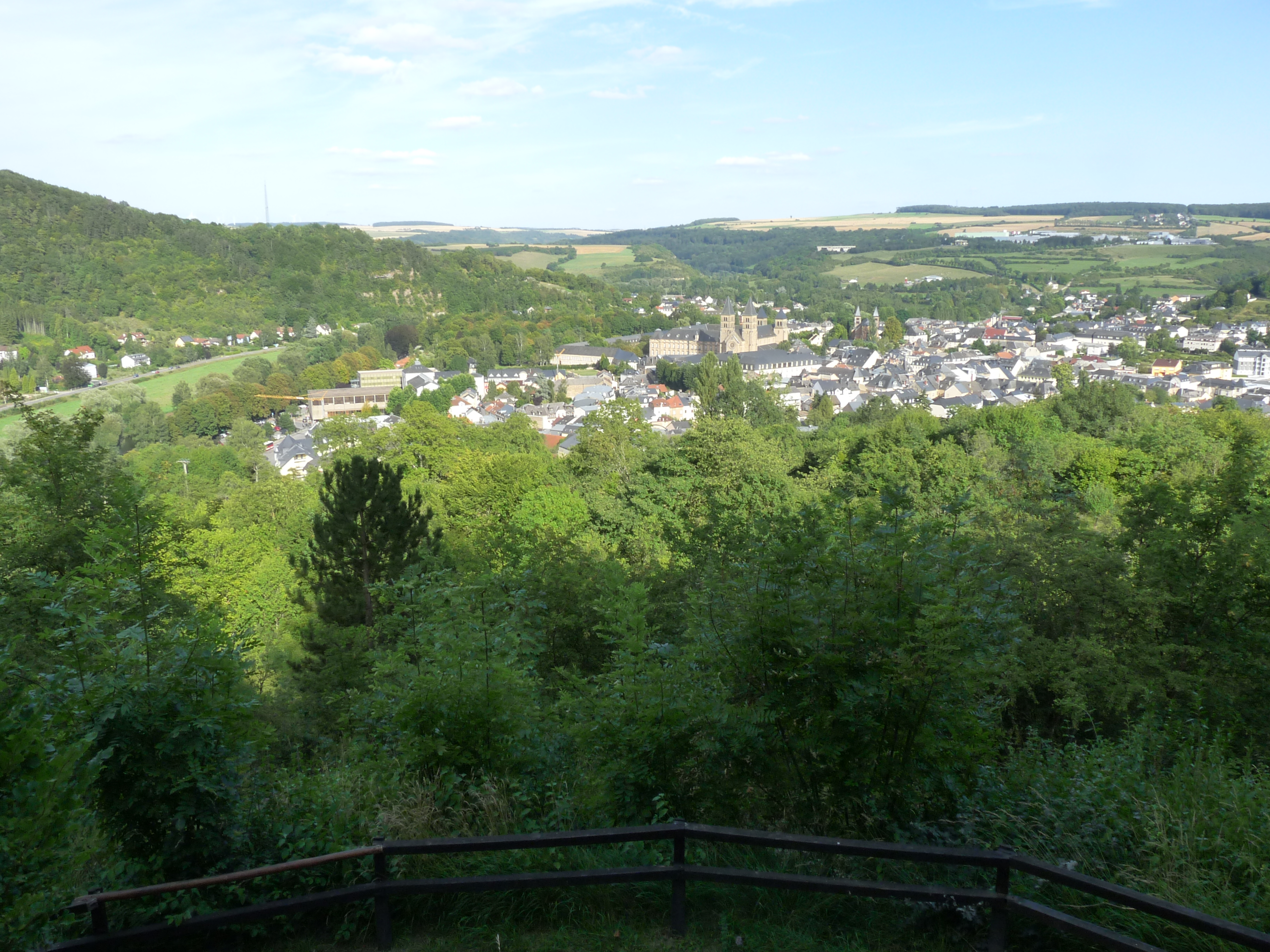 Pohled na Echternach shora turistické trasy číslo 2.